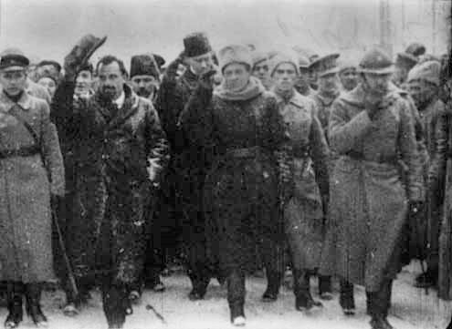 A photo of Symon Petlura and Volodymyr Vynnychenko